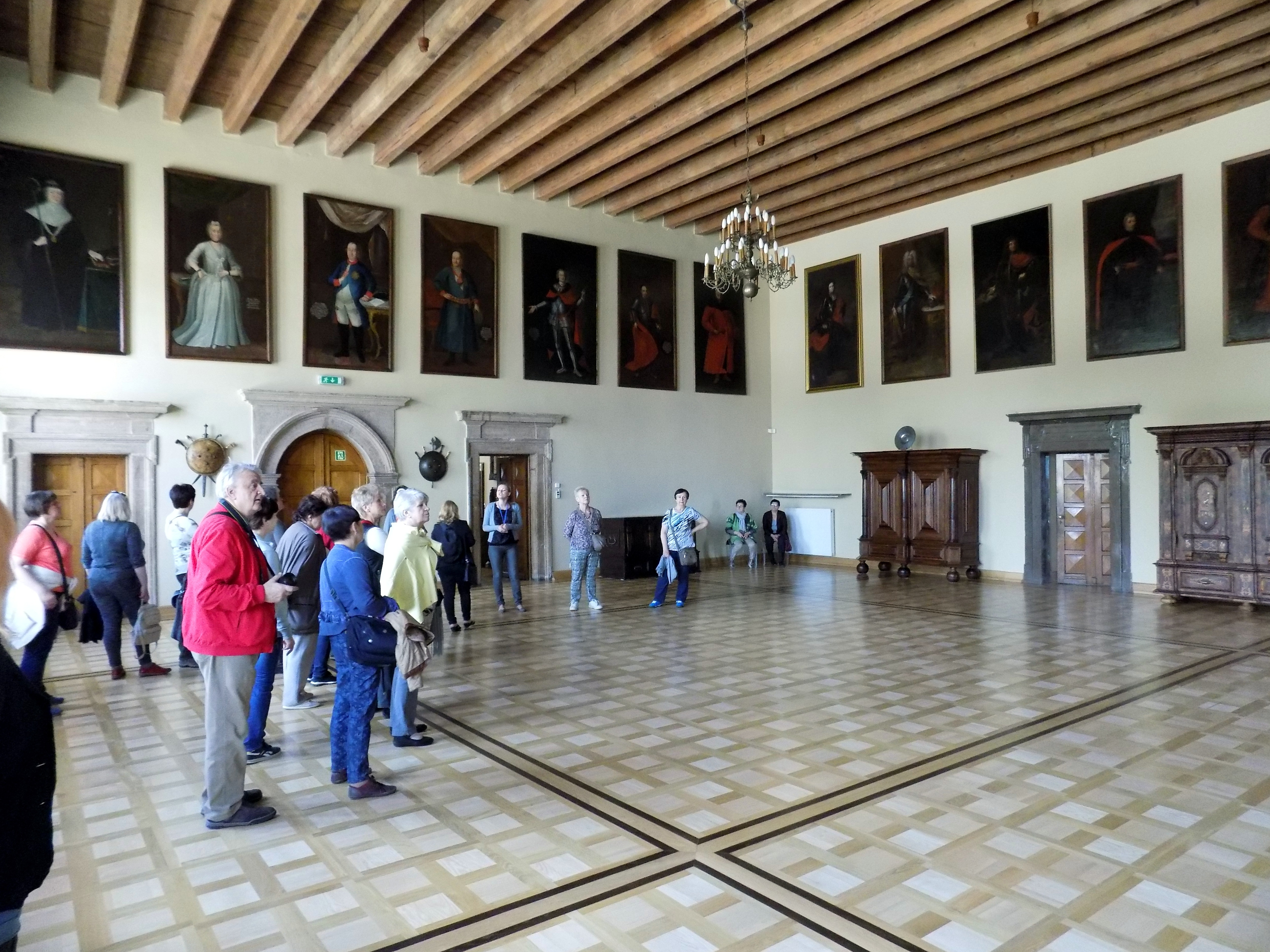 Kielce, Pałac Biskupów Krakowskich w Kielcach Wikidata has entry Q586771 with data related to this item.